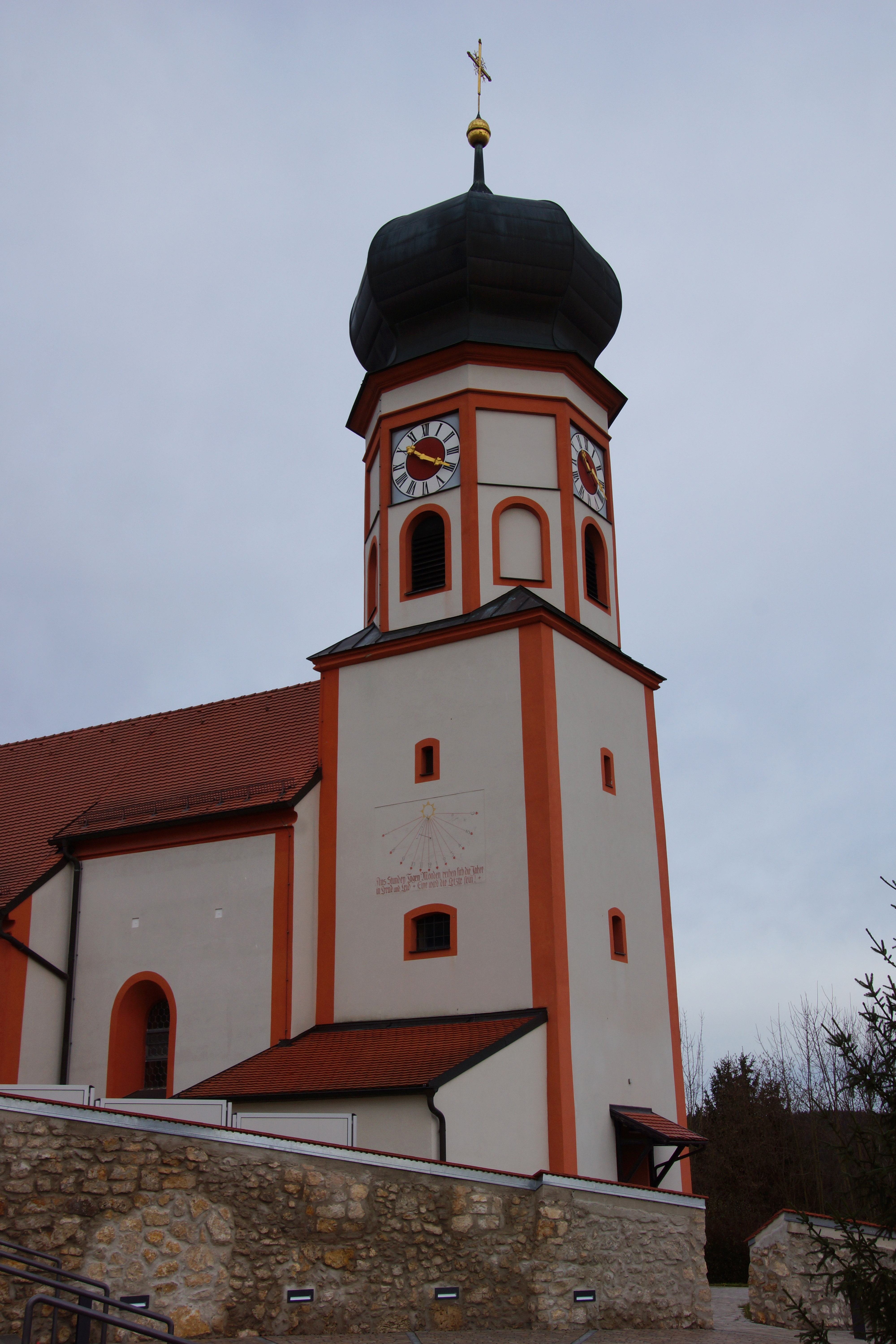 Die katholische Pfarrkirche St. Martin - Deuerling Oberpfalz